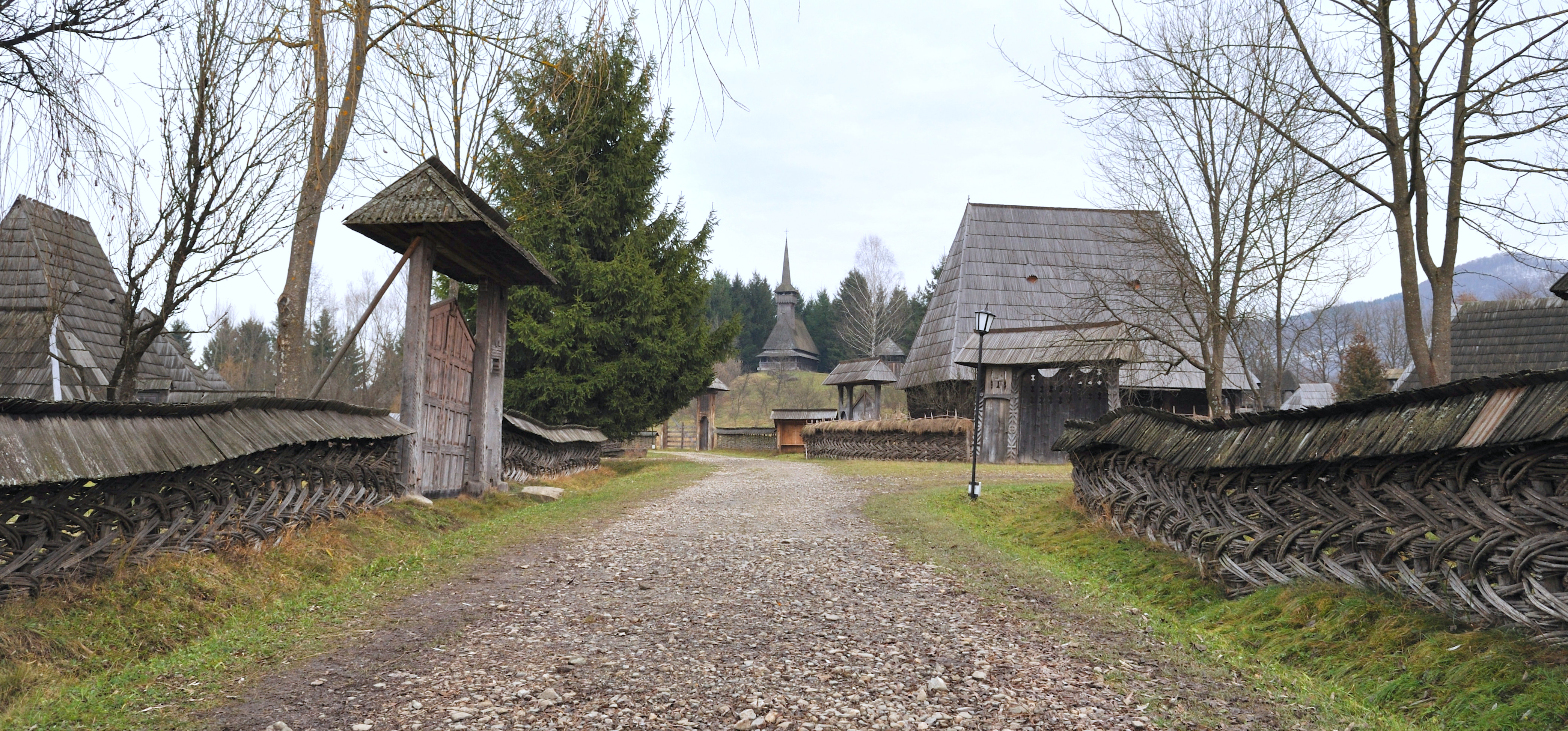 Muzeul satului maramureșean din Sighetu-Marmației